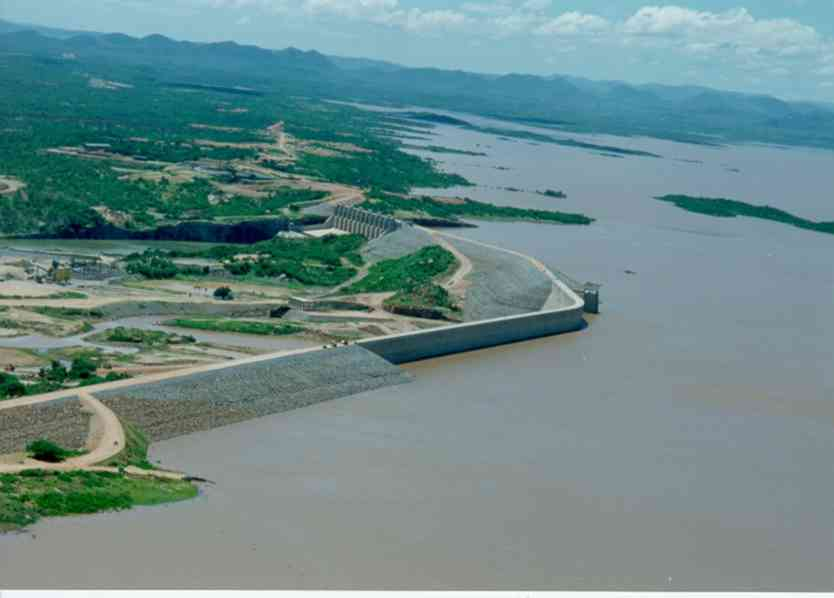 Castanhão